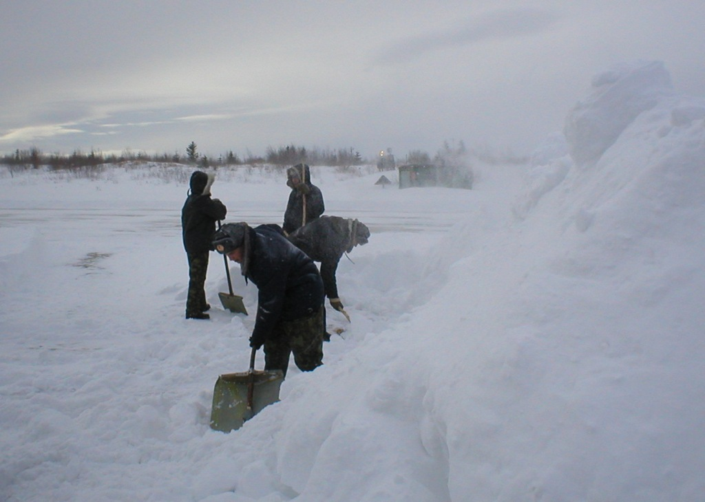 Уборка аэродрома